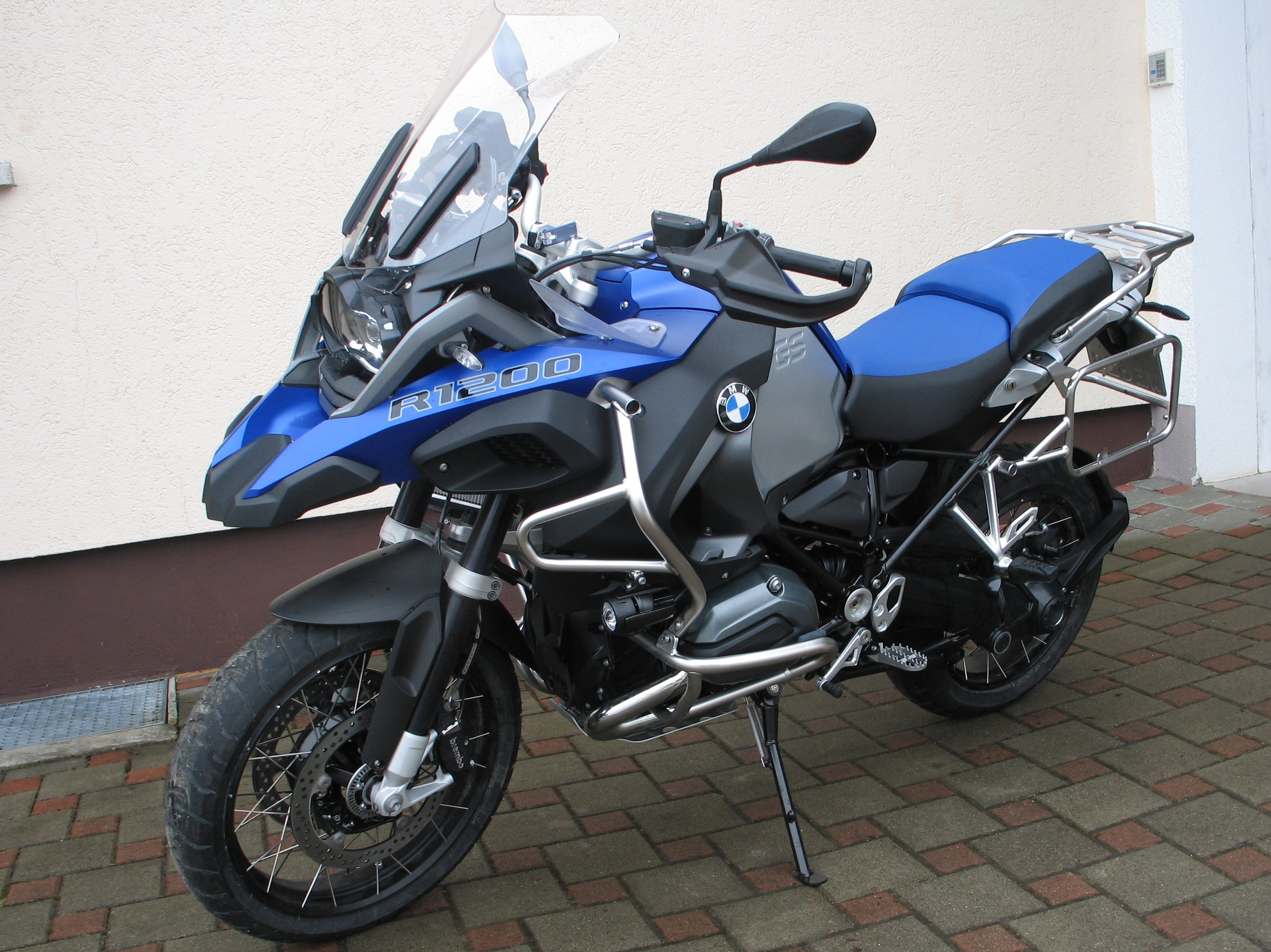 BMW R 1200 GS Adventure (K51) im Farbmuster racing blue metallic matt